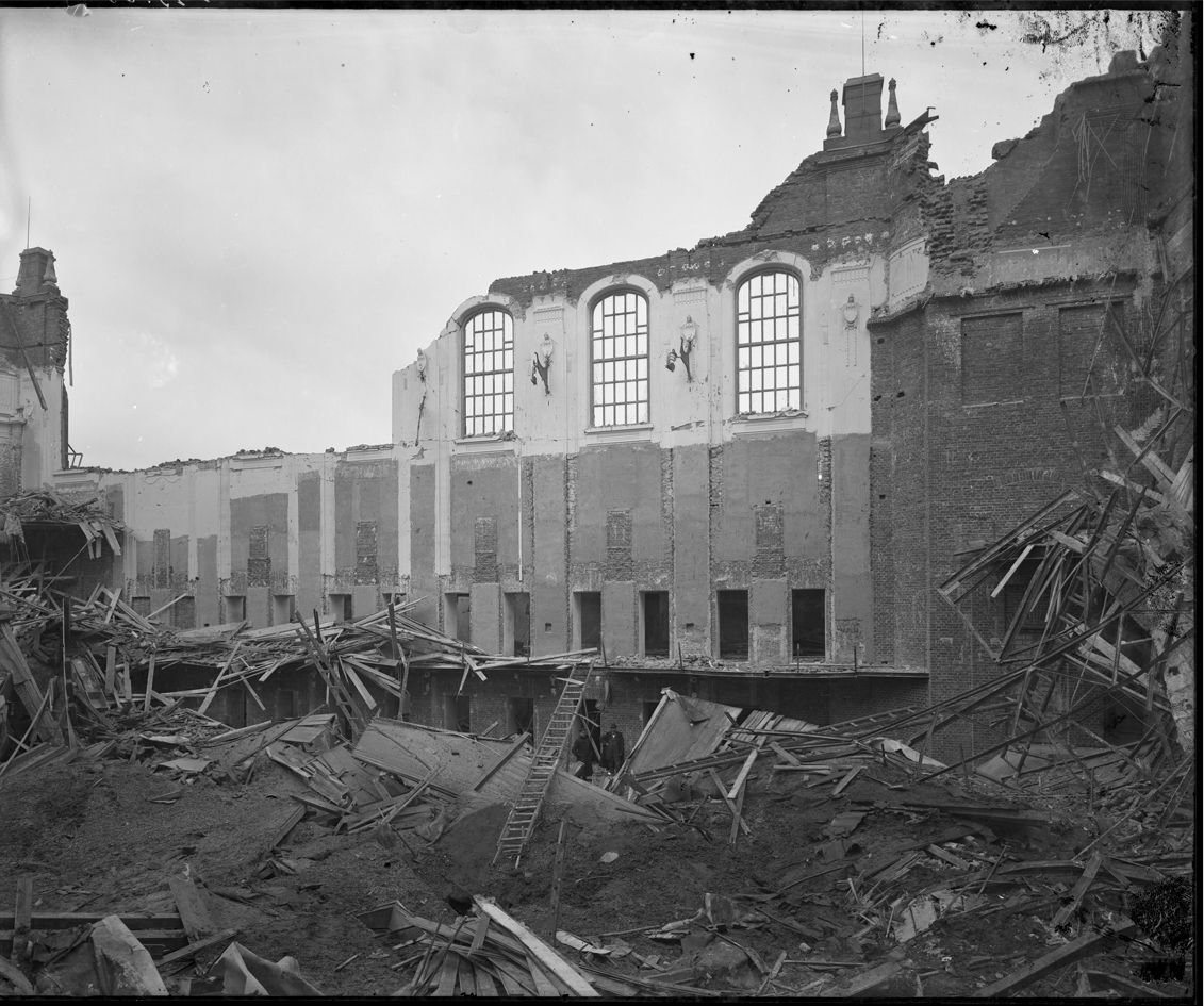 Stadthalle Görlitz nach dem Dacheinsturz vom 9. Mai 1908